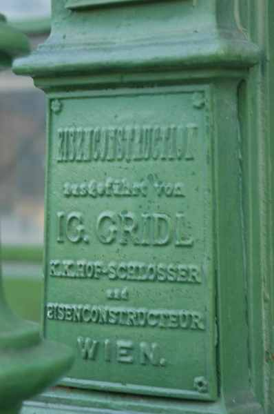 Palmenhaus Schoenbrunn - Tafel ausfuehrende Firma Gridl